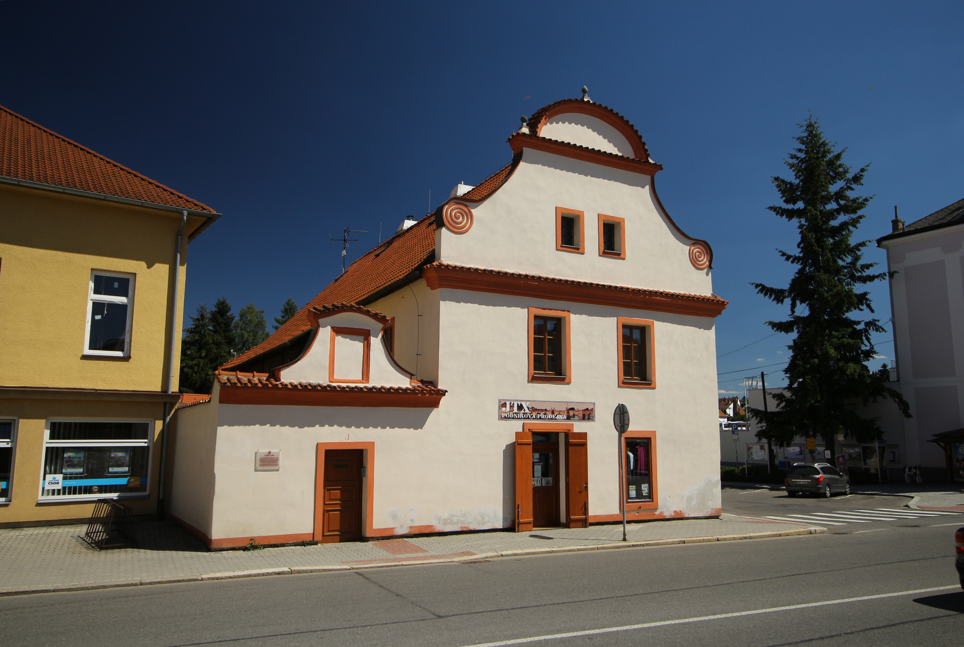 Milevsko náměstí a okolí